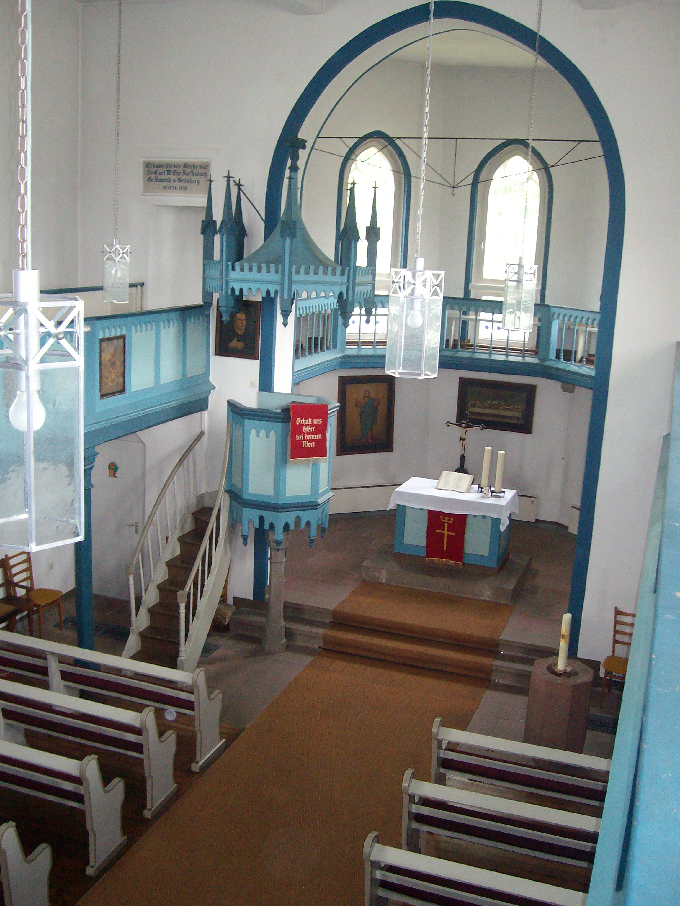 Evangelische Kirche Röthges, Laubach, Landkreis Gießen, Hessen, Deutschland